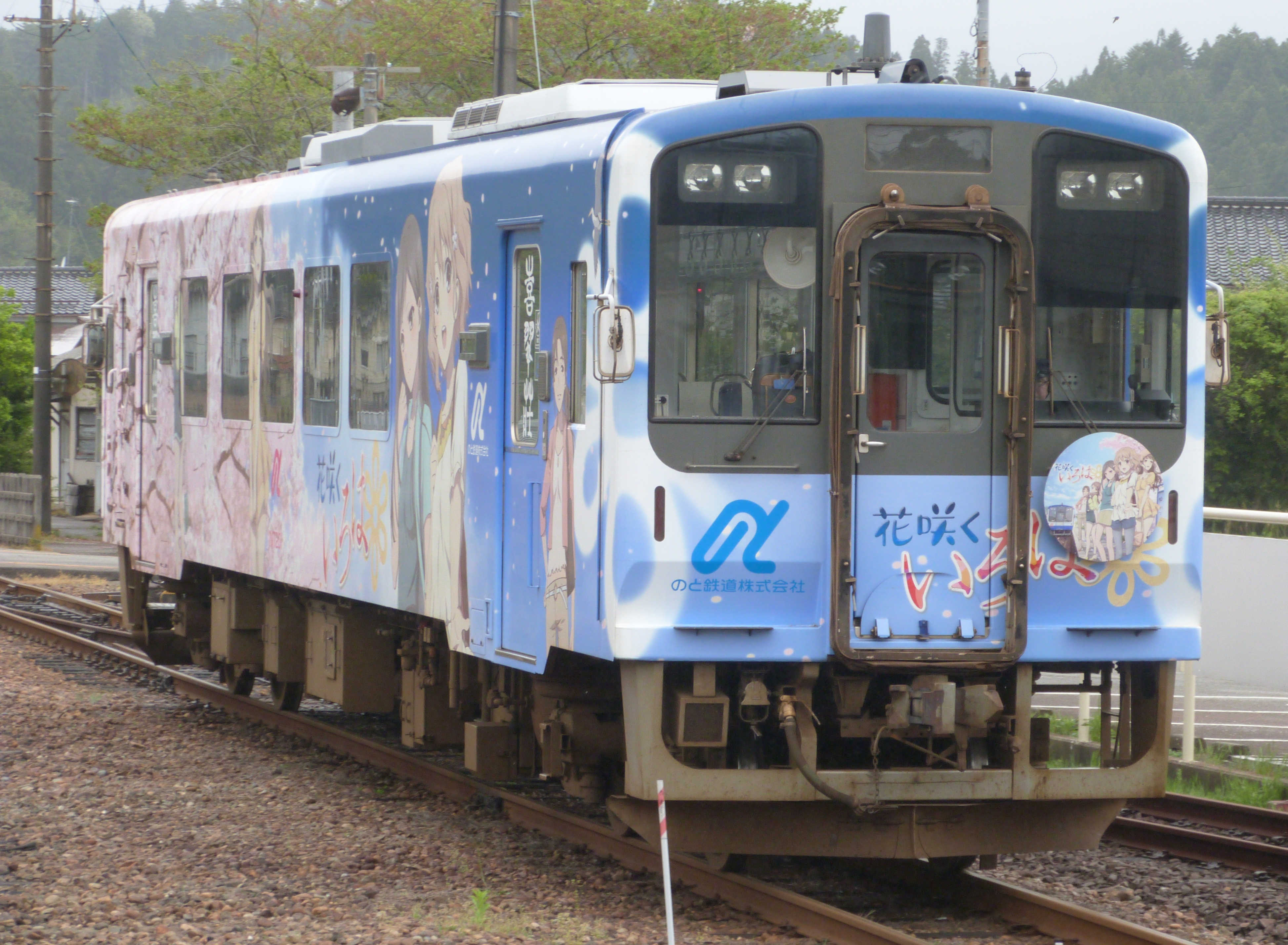 穴水にて、のと鉄道NT200形気動車NT201号車「花咲くいろは」ラッピング車両。